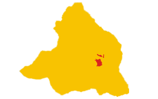 Mappa di San Giovanni in Fiore in 16:10